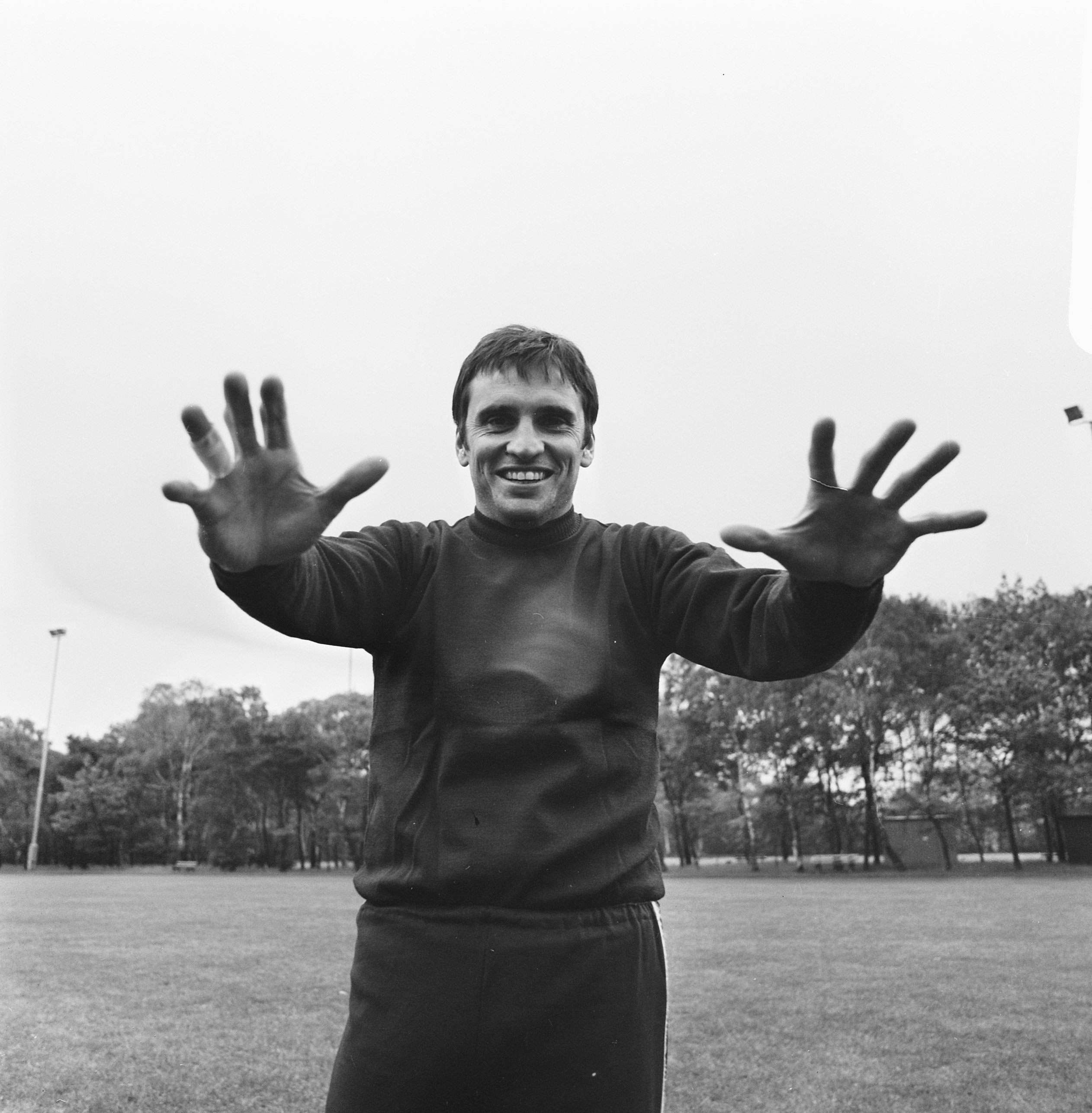 Collectie / Archief : Fotocollectie Anefo Reportage / Serie : [ onbekend ] Beschrijving : WK 74; training Uruguay in Duitsburg, keeper Mazurkievic laat zijn handen zien Datum : 10 juni 1974 Locatie : Duisburg Trefwoorden : HANDEN, keepers, sport, voetbal Fotograaf : Mieremet, Rob / Anefo Auteursrechthebbende : Nationaal Archief Materiaalsoort : Negatief (zwart/wit) Nummer archiefinventaris : bekijk toegang 2.24.01.03 Bestanddeelnummer : 927-2464